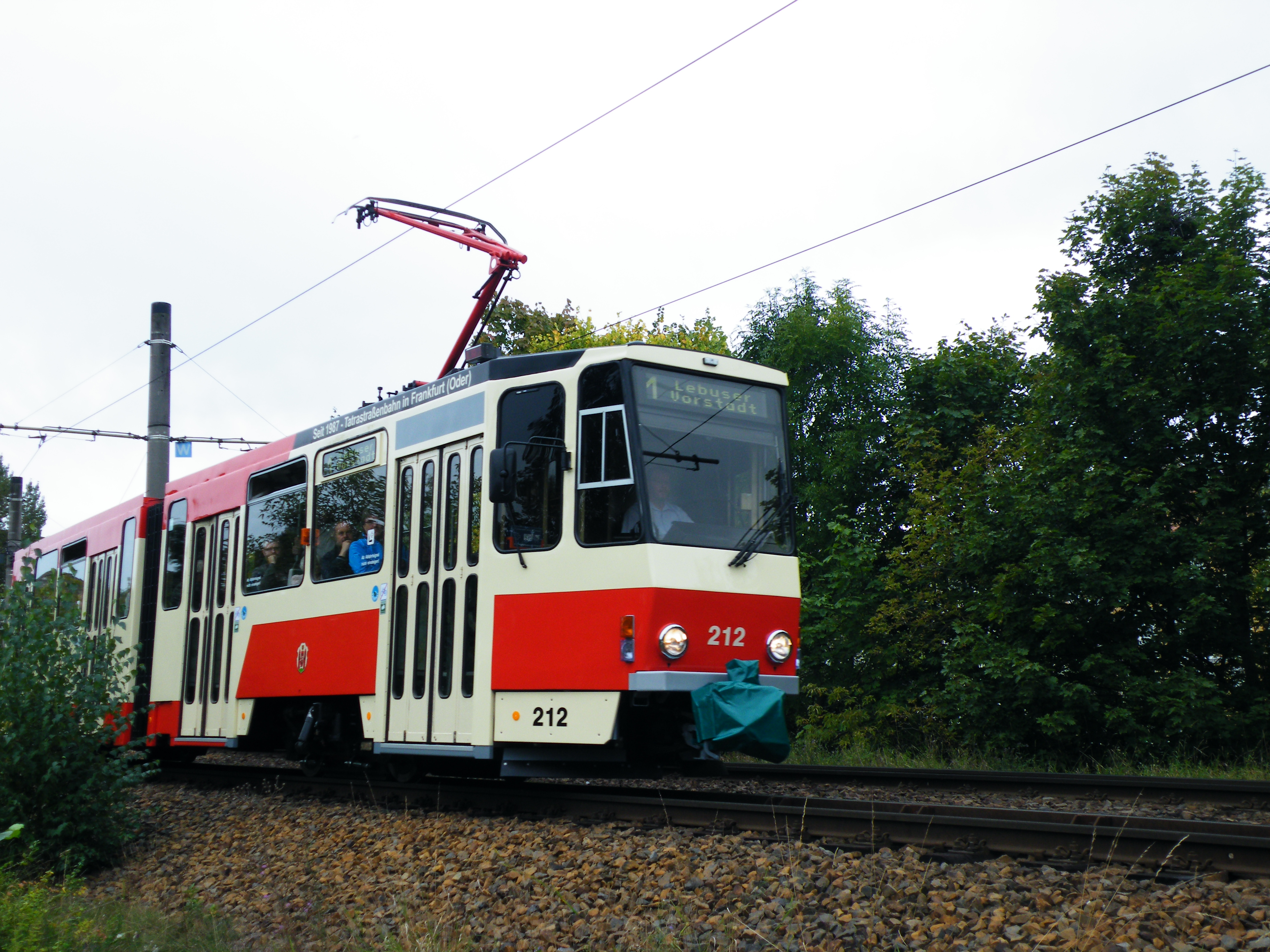 Der selbe Wagen im Jahr 1990